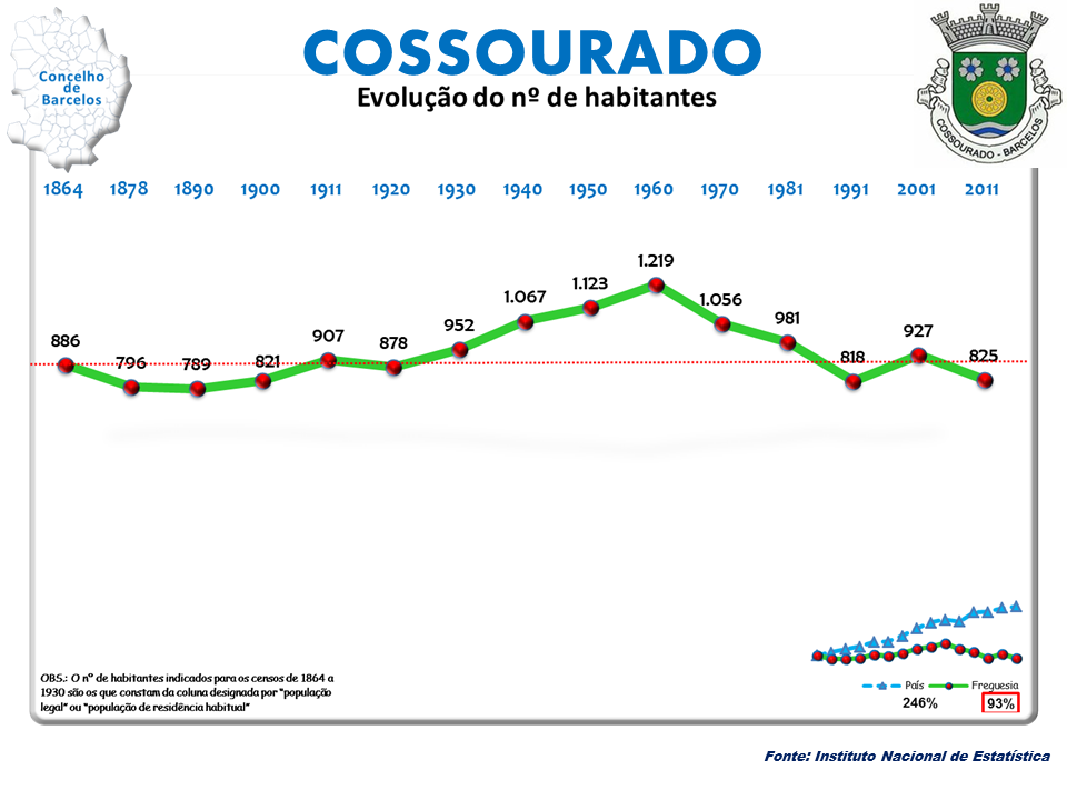 Censos 1864/2011